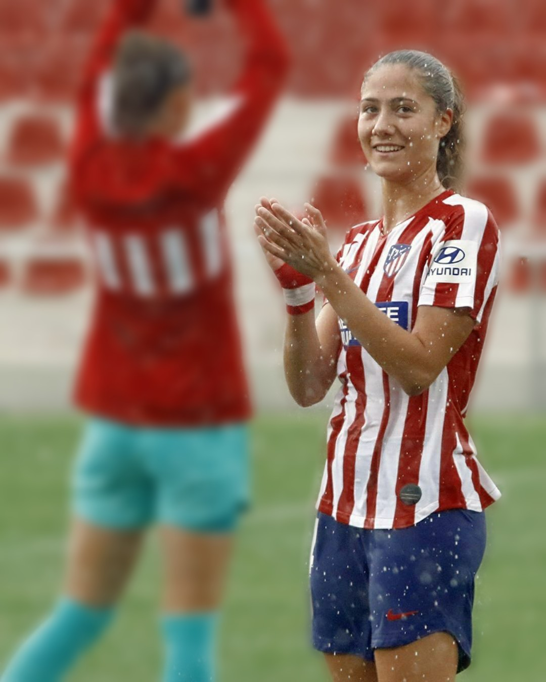 Laia Aleixandri, jugadora del Atlético de Madrid, y de la selección española.